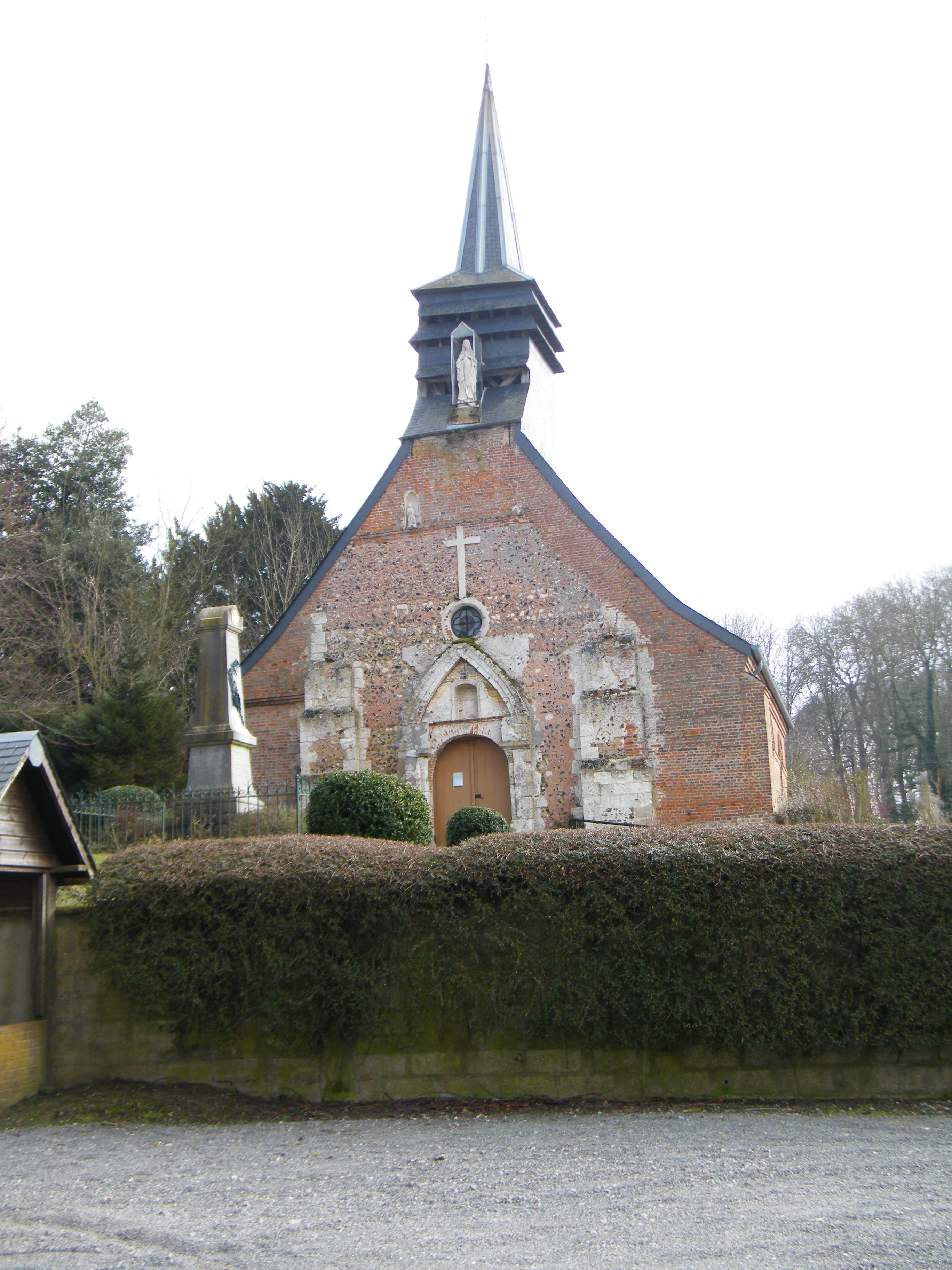 église Saint-Roch.